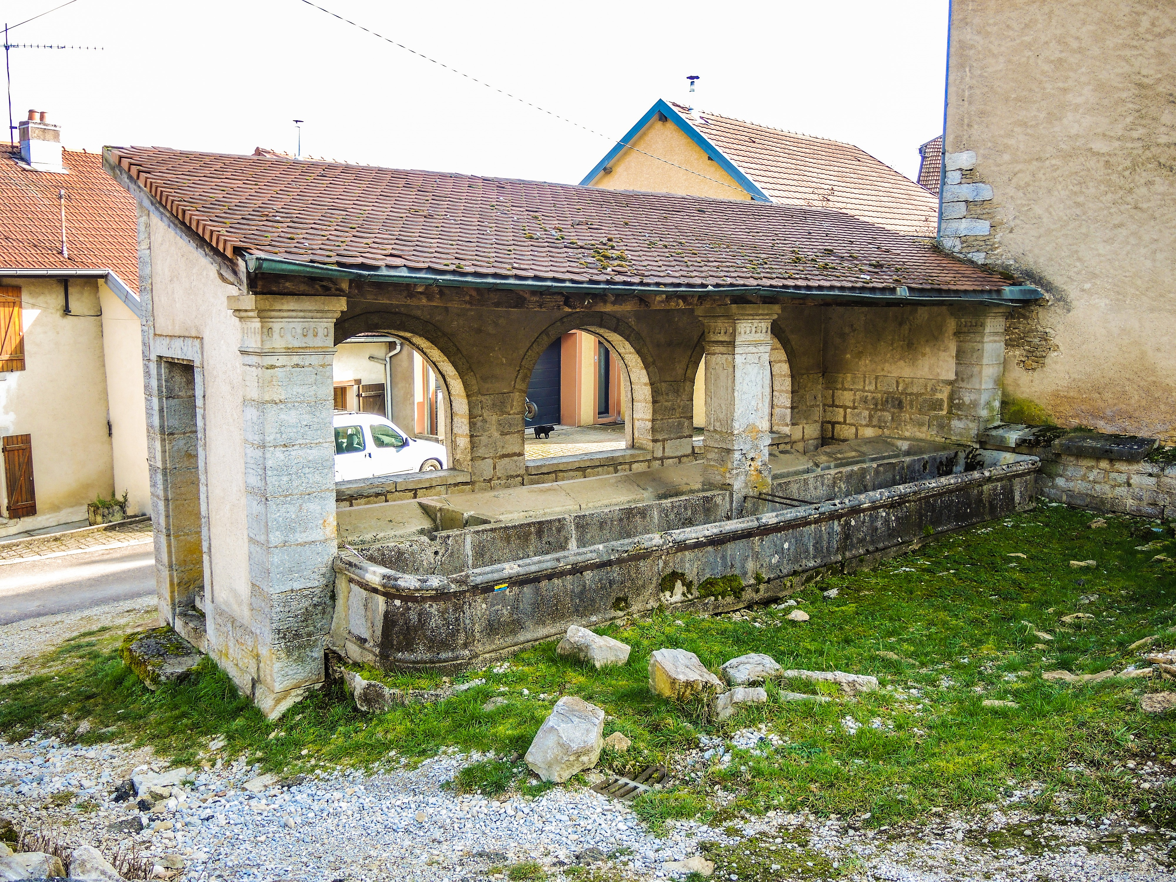 Fontaine-lavoir couverte. Montenois. Doubs.